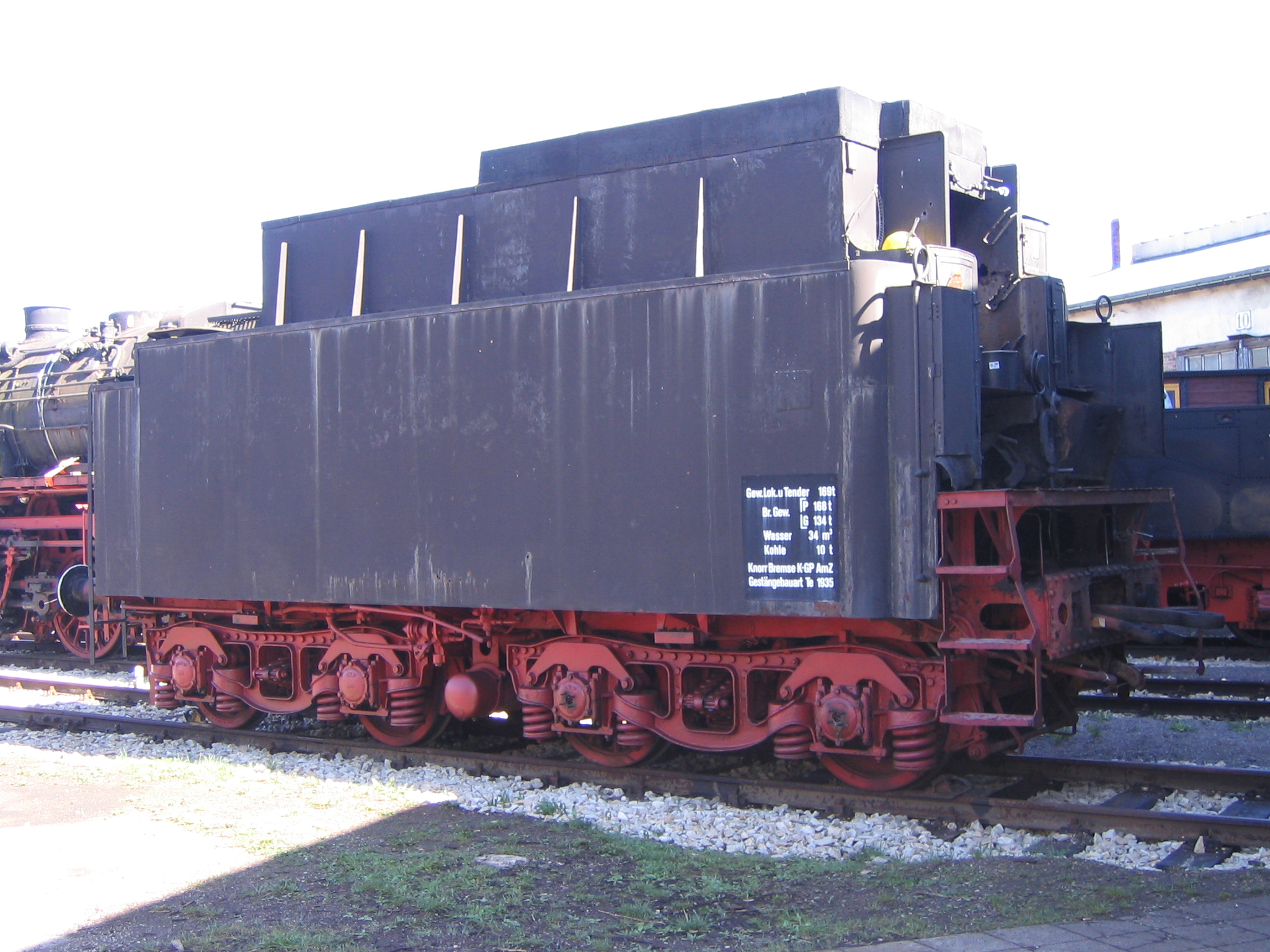 Tender des Typs 2'2' T34 im Bayerischen Eisenbahnmuseum in Nördlingen